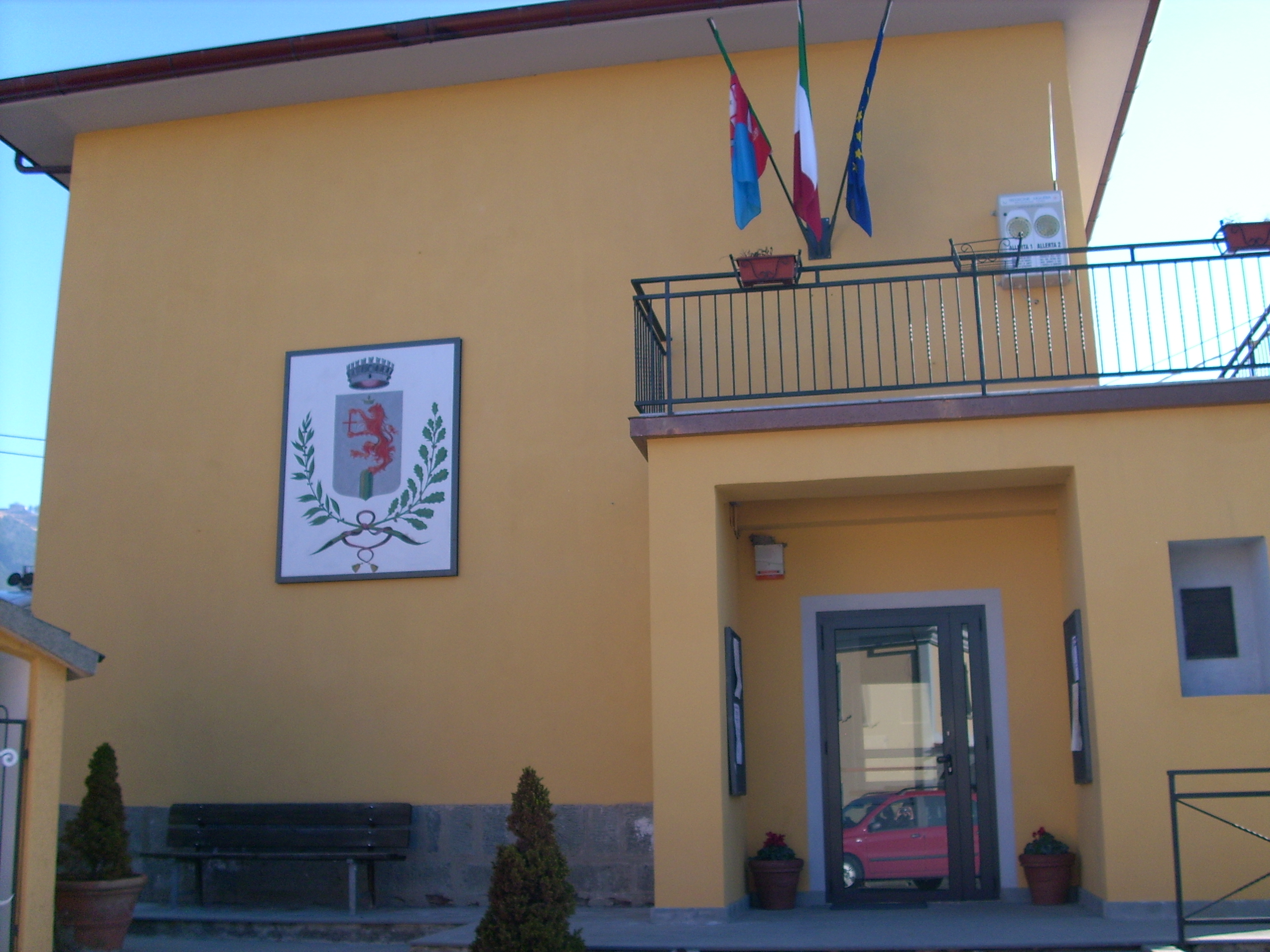 Municipio di Zignago, Liguria, Italy